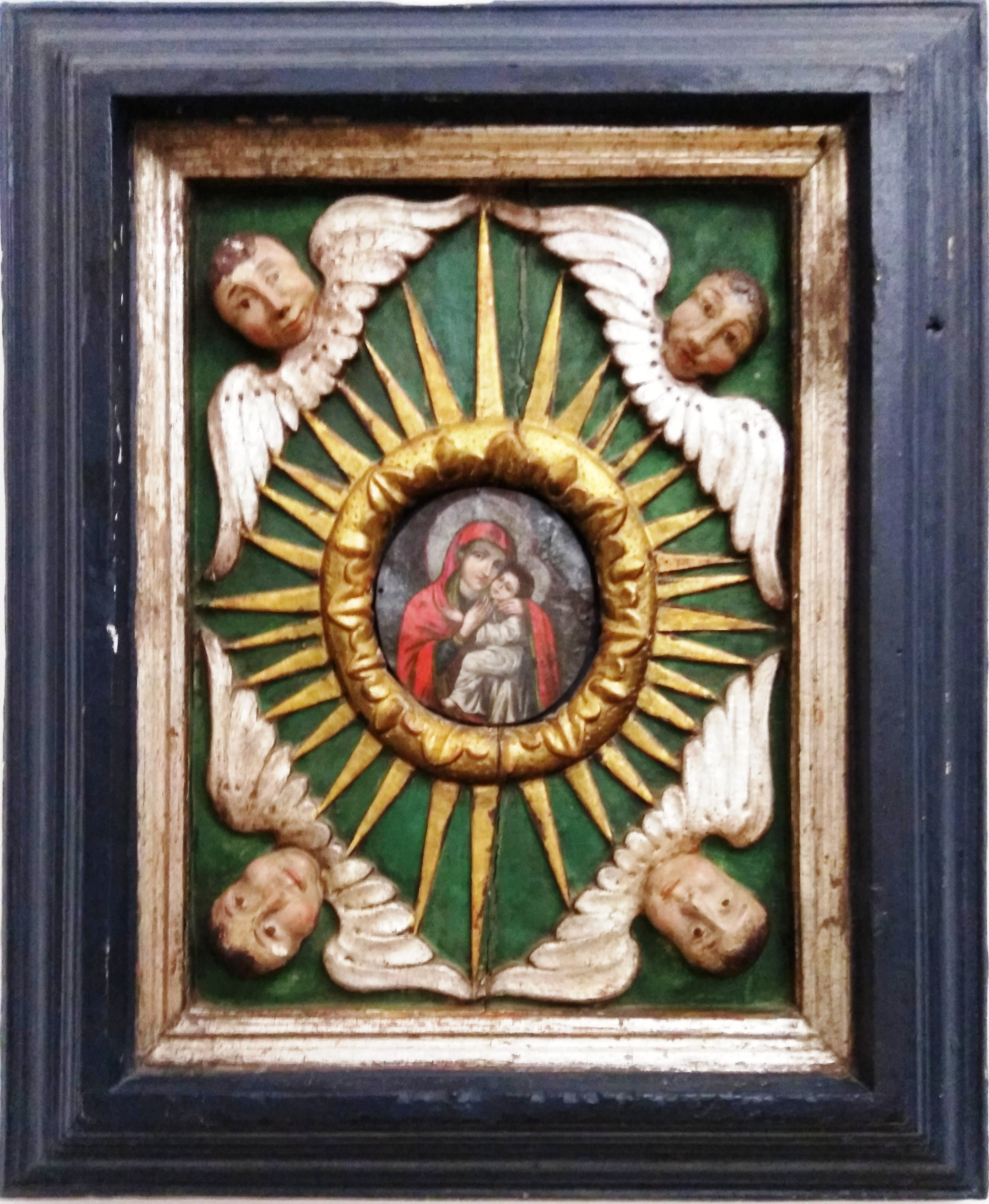 Ікона Богоматір, автор невідомий, ХVII ст., оклад ХІХ ст.